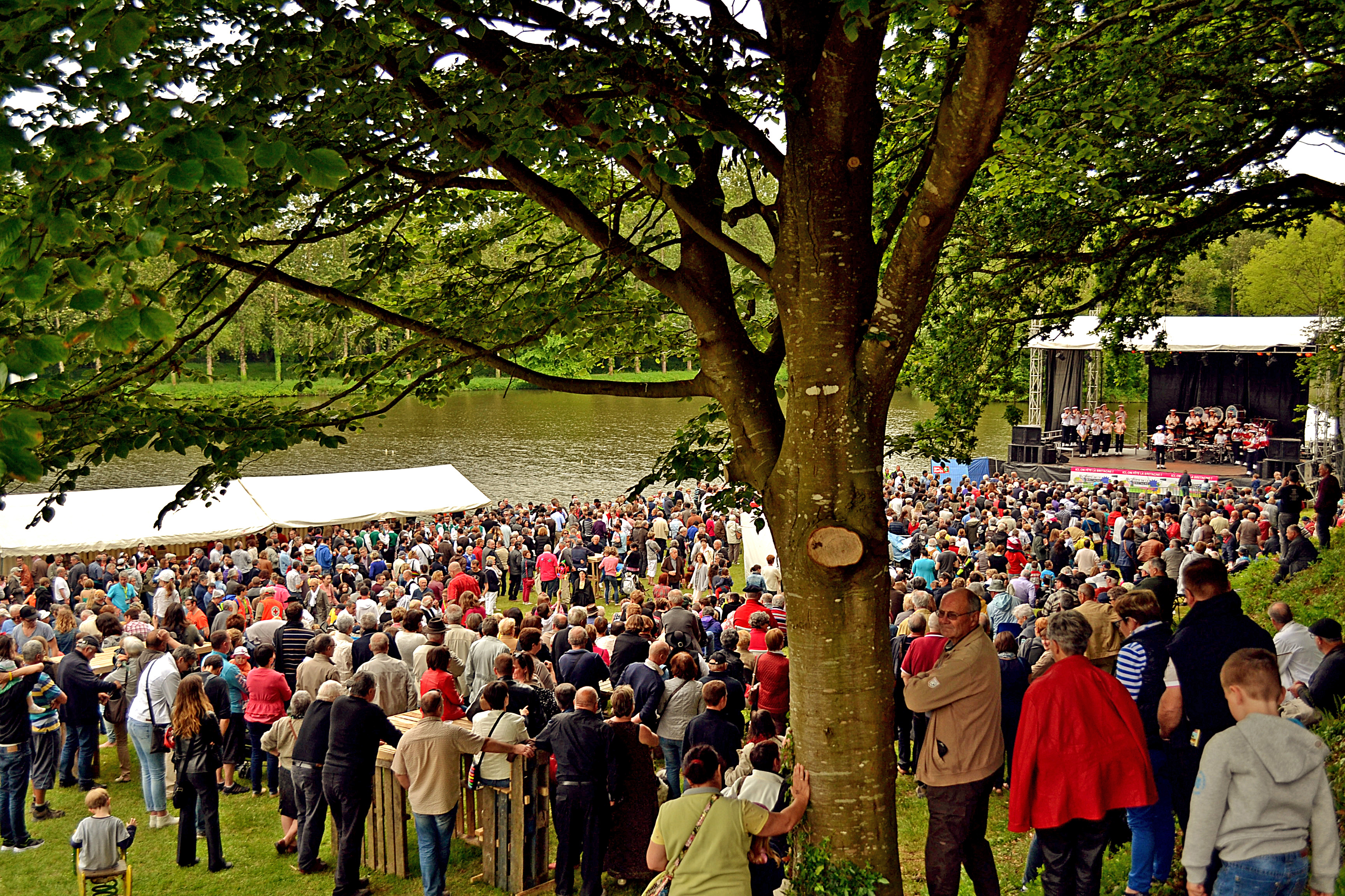 3e édition du festival Gouel Bro Leon au plan d'eau à Plouvorn le 24 mai 2015